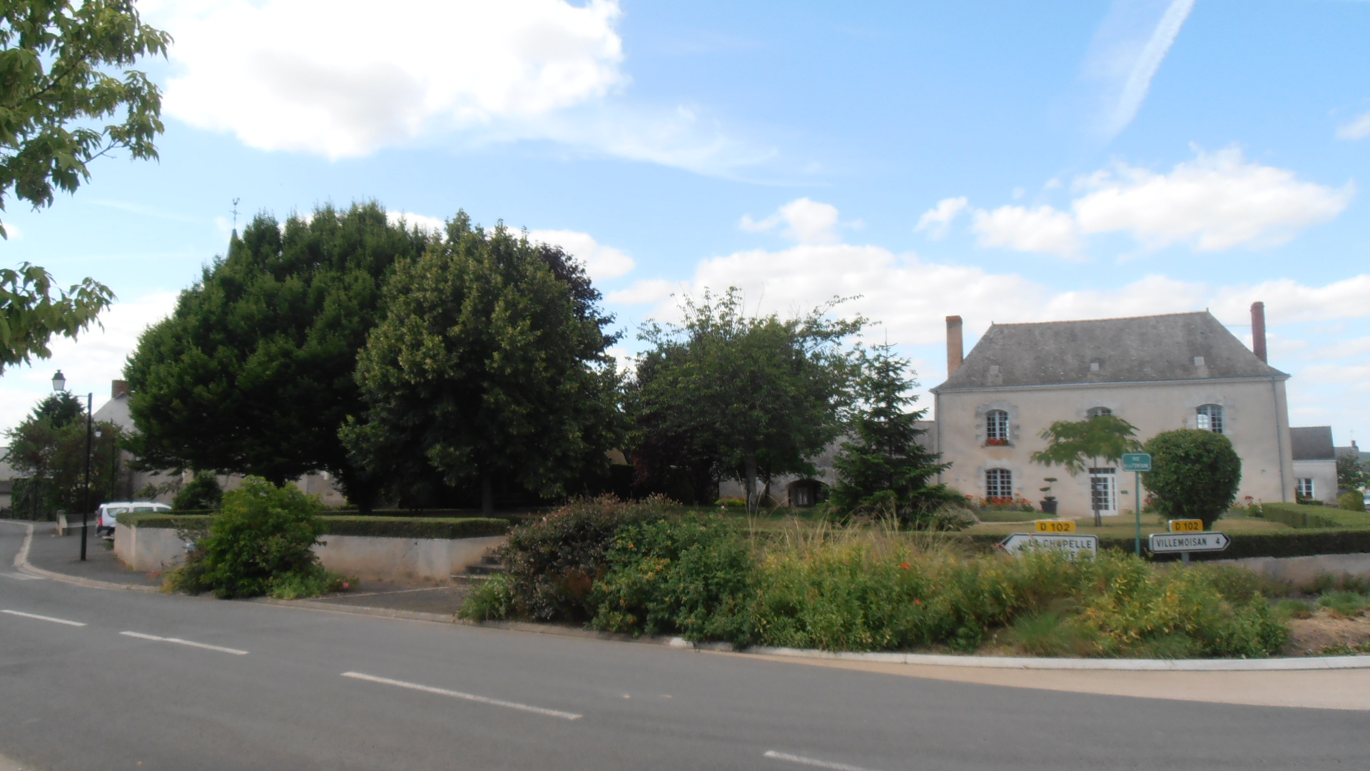 Centre de Saint-Sigismond (Maine-et-Loire, France) avec l'église à gauche cachée par les arbres et la mairie à droite.